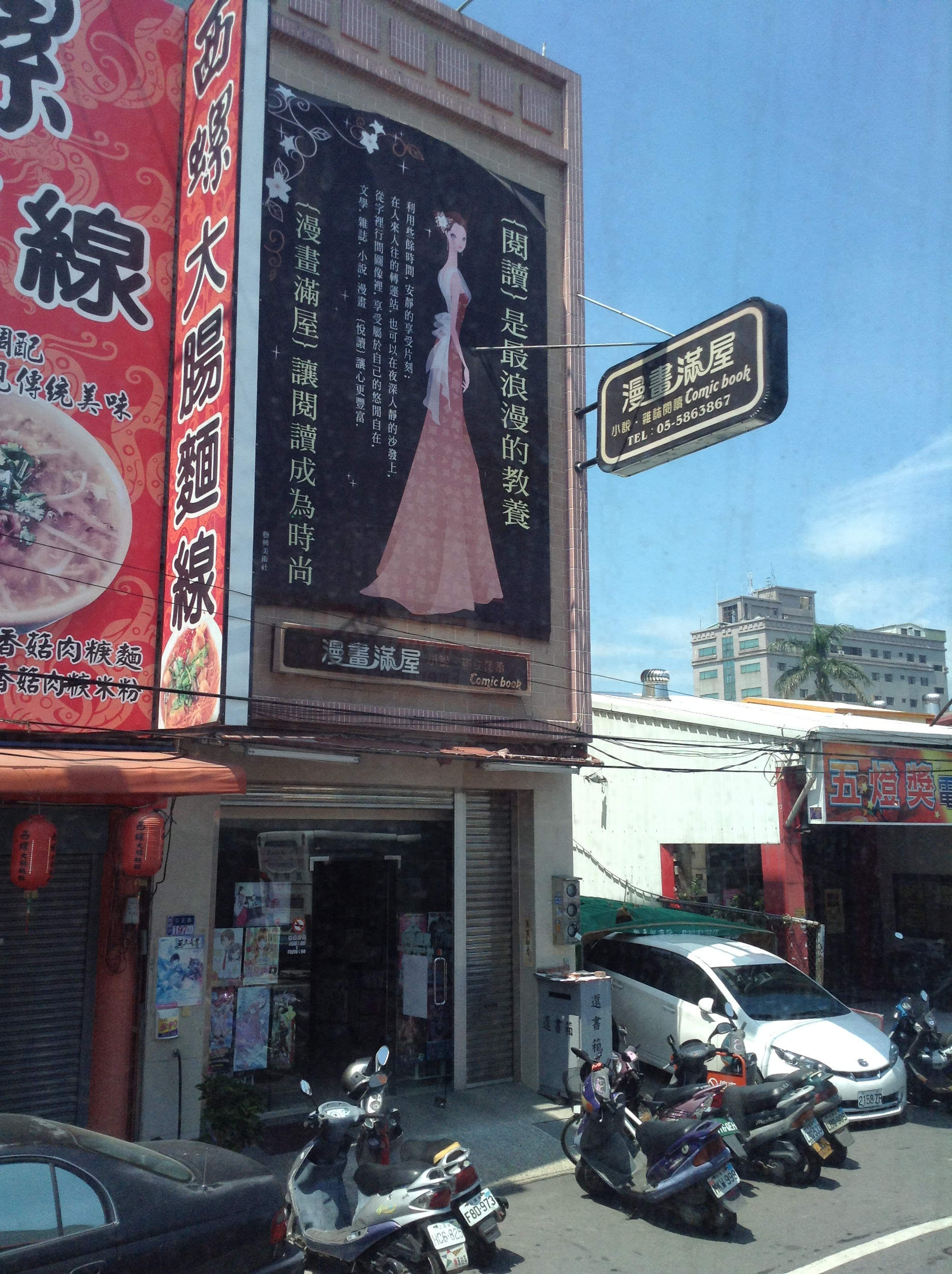 臺灣雲林縣西螺鎮臺西客運旁的漫畫滿屋租書店